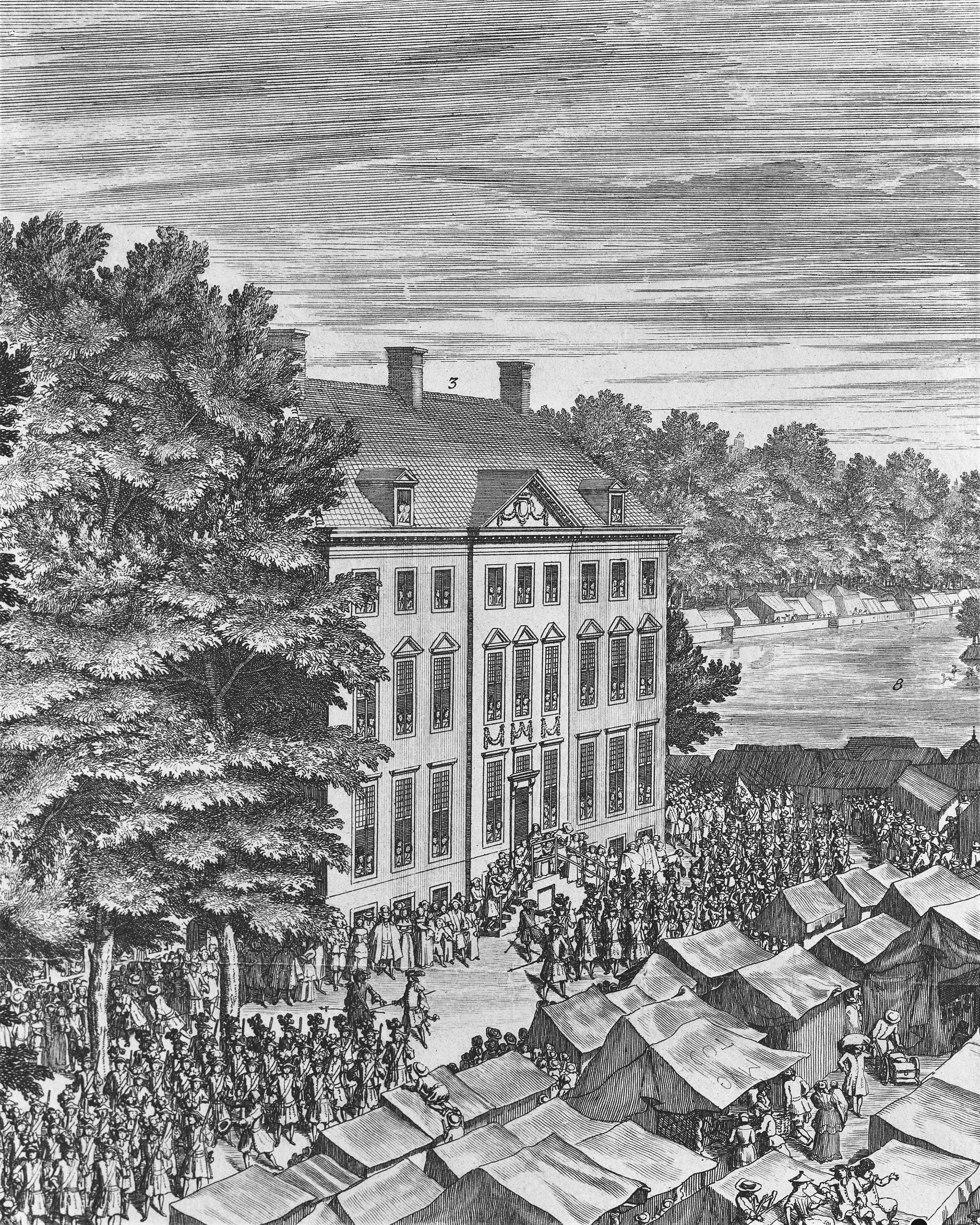 Kadastergebouw: origineel in bezit van Gemeente Archief